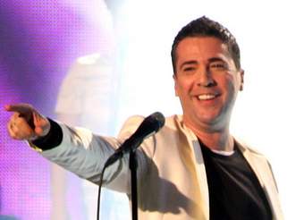 Zeljko Joksimovic